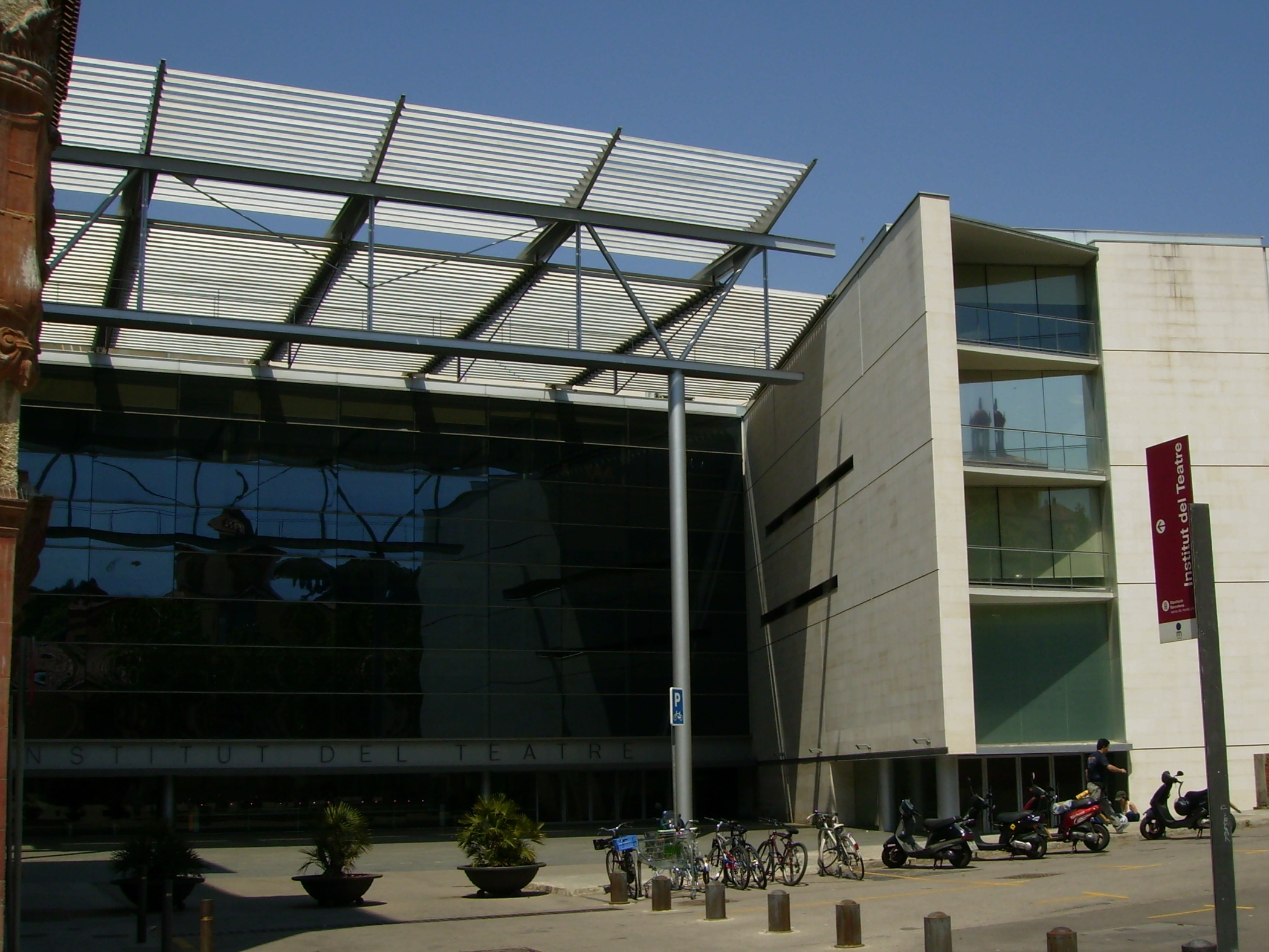 Institut del Teatre - Plaça Margarida Xirgu, s/n, Barcelona (Catalunya). Arquitectes Ramón Artigues & Ramón Sanabria (any 2000)